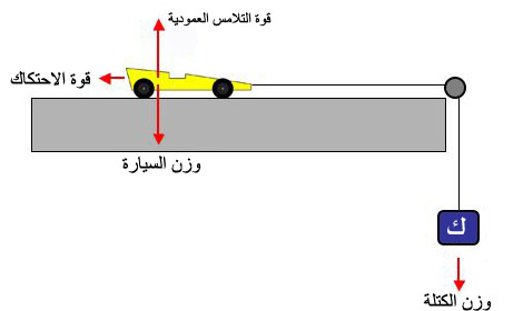 صورة تبين القوى المؤثرة على سيارة (لعبة) مربوطة ببكرة